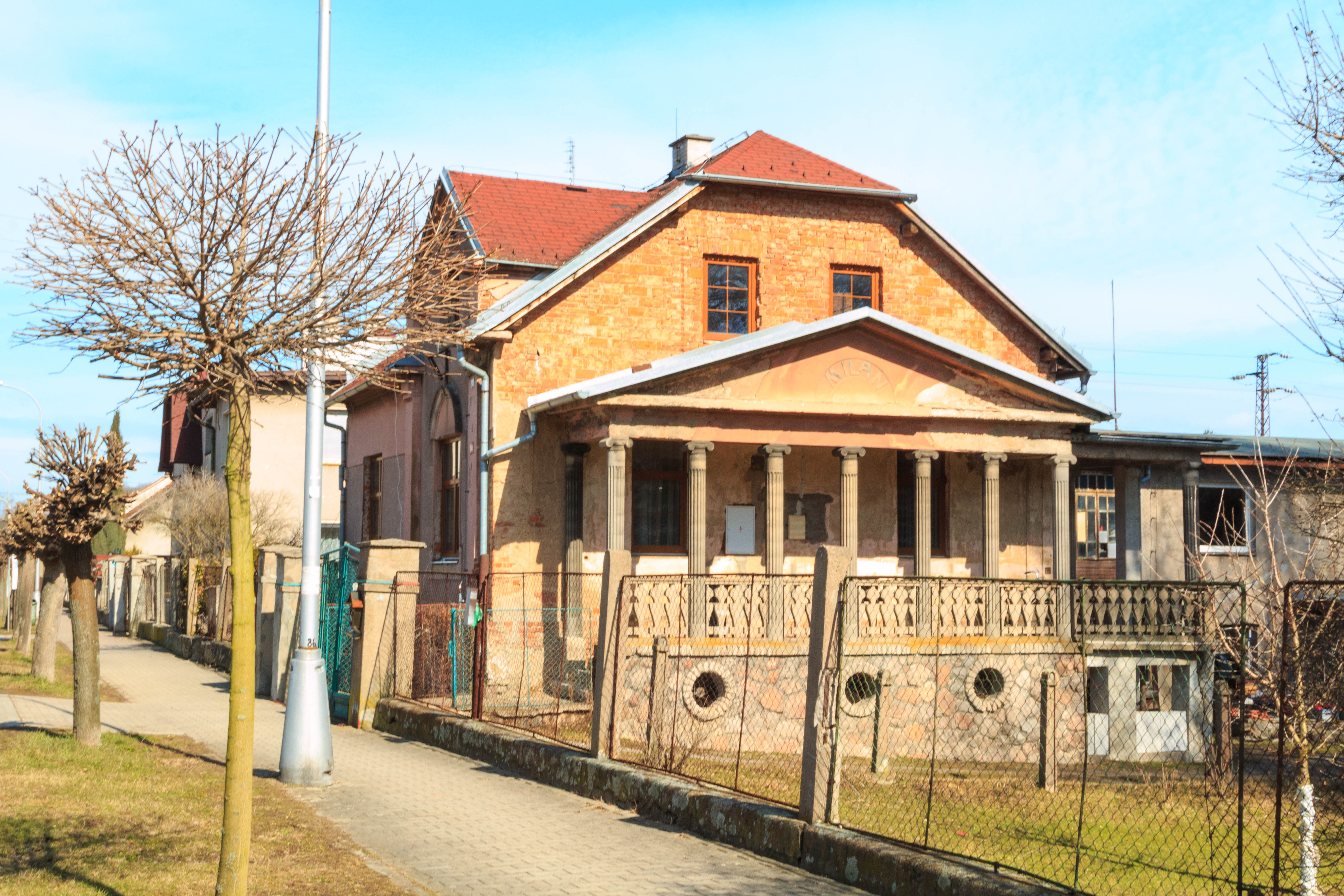 Vyhnánov u Doudleb nad Orlicí - čp. 1